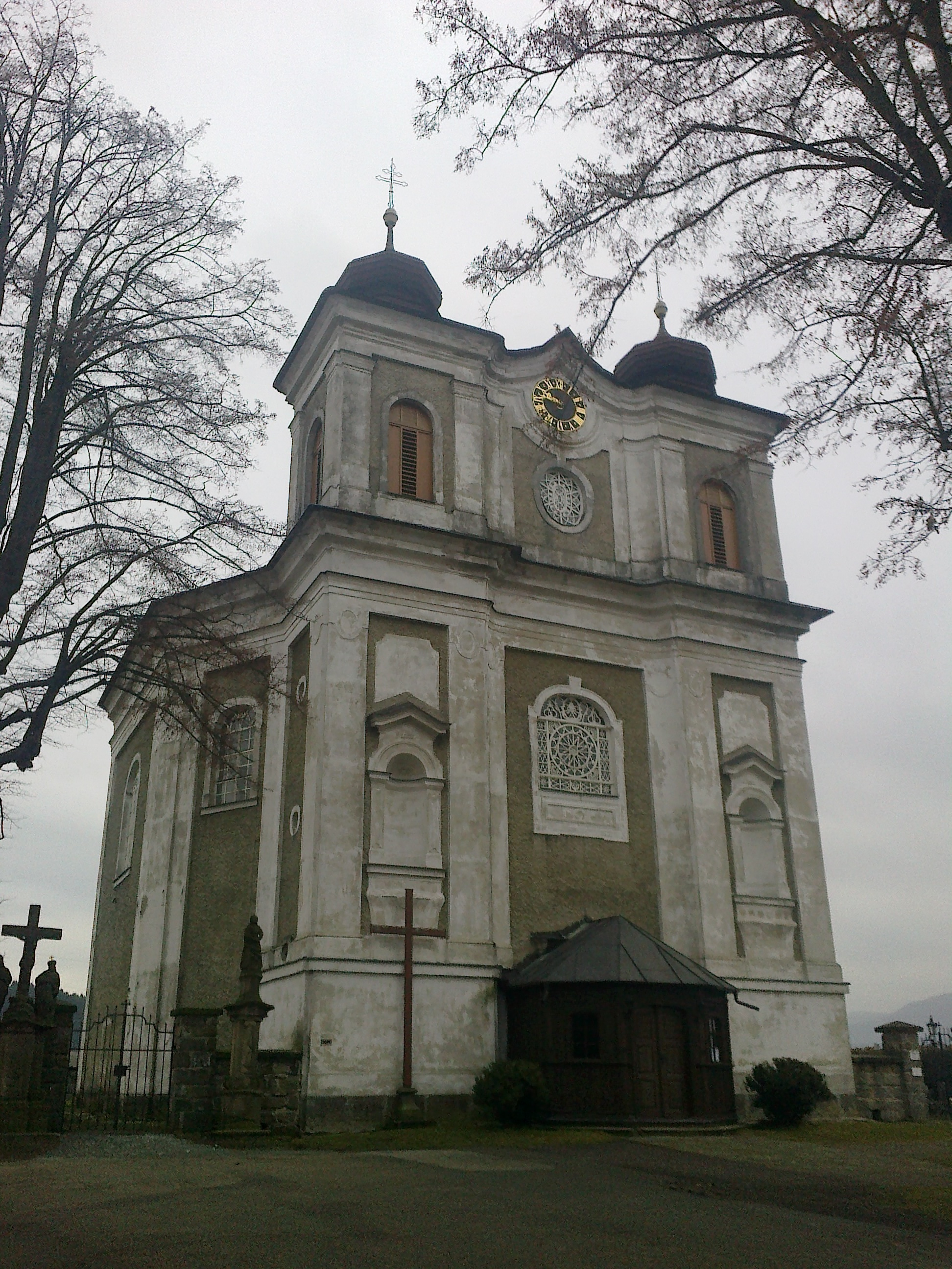 Bezděkov nad Metují - kostel sv. Prokopa